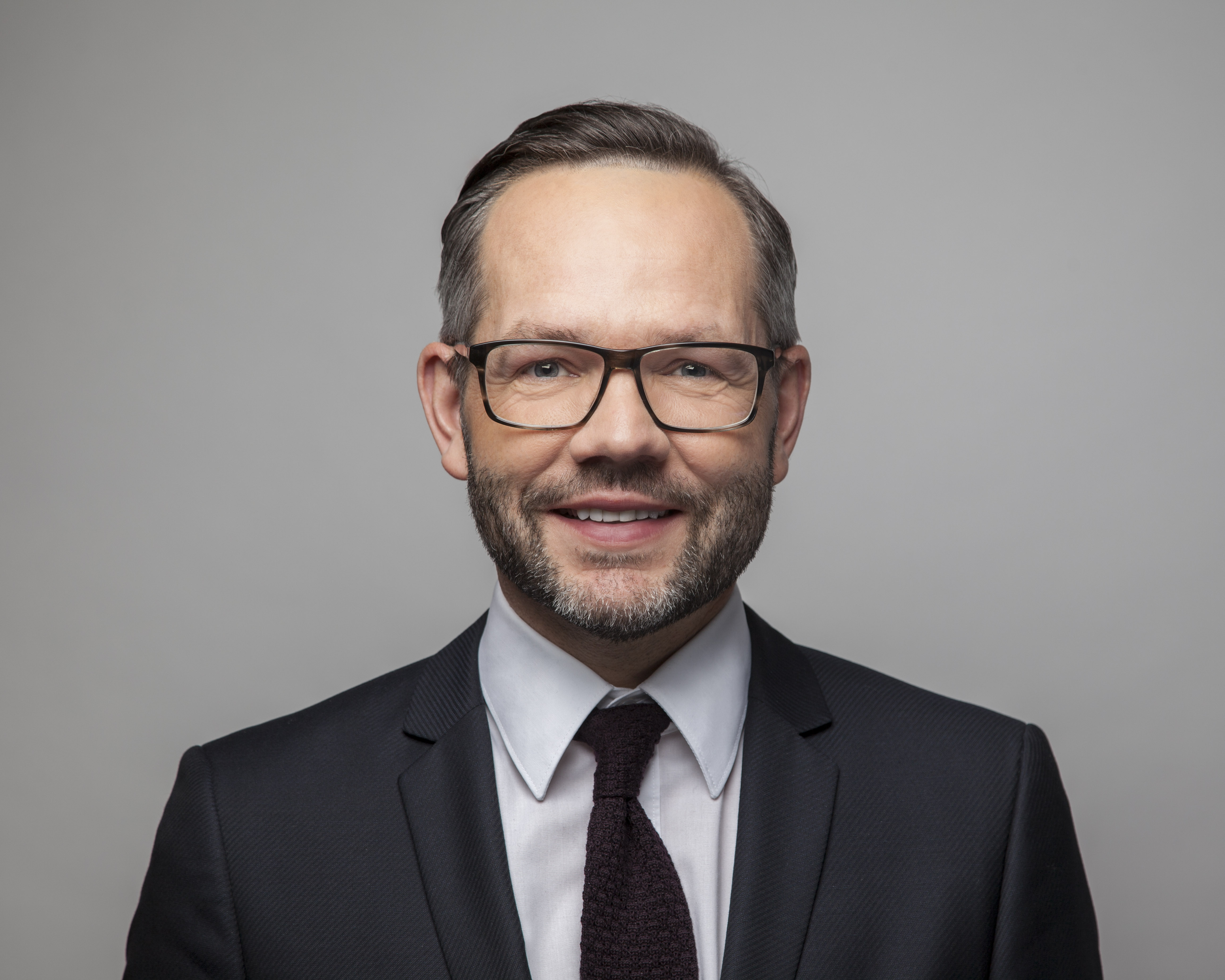 Offizielles Pressefoto des Staatsministers für Europa im Auswärtigen Amt, Michael Roth MdB. Foto: Michael Farkas